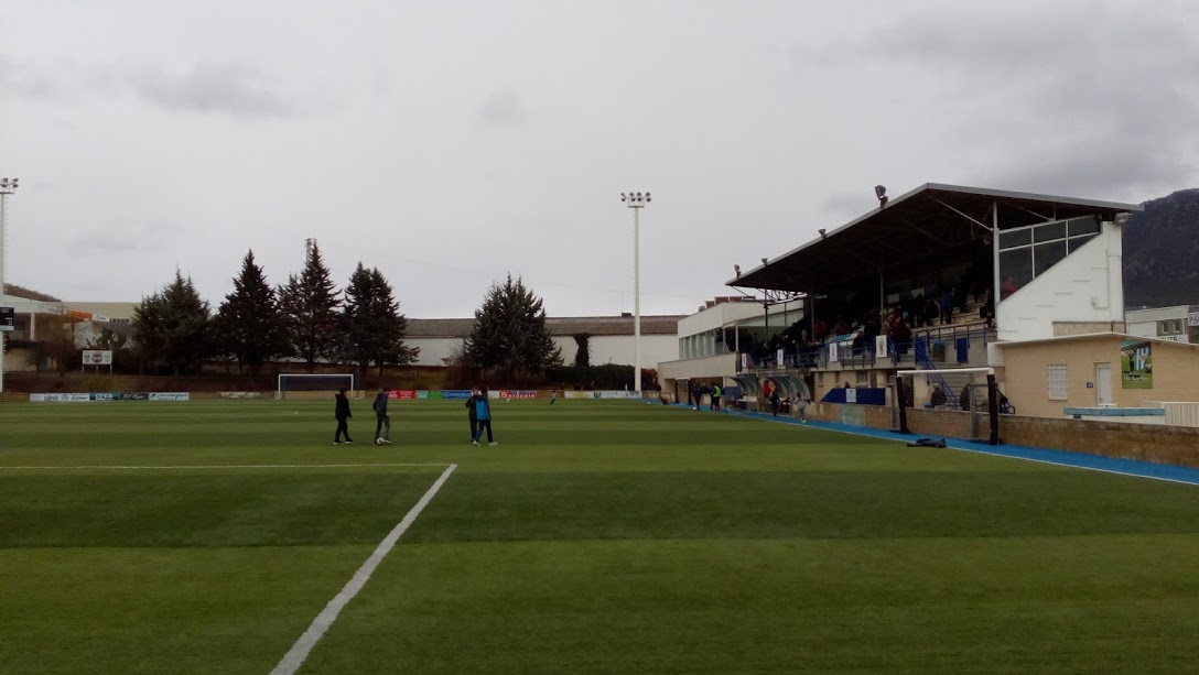 Tribuna de Merkatondoa desde fondo norte